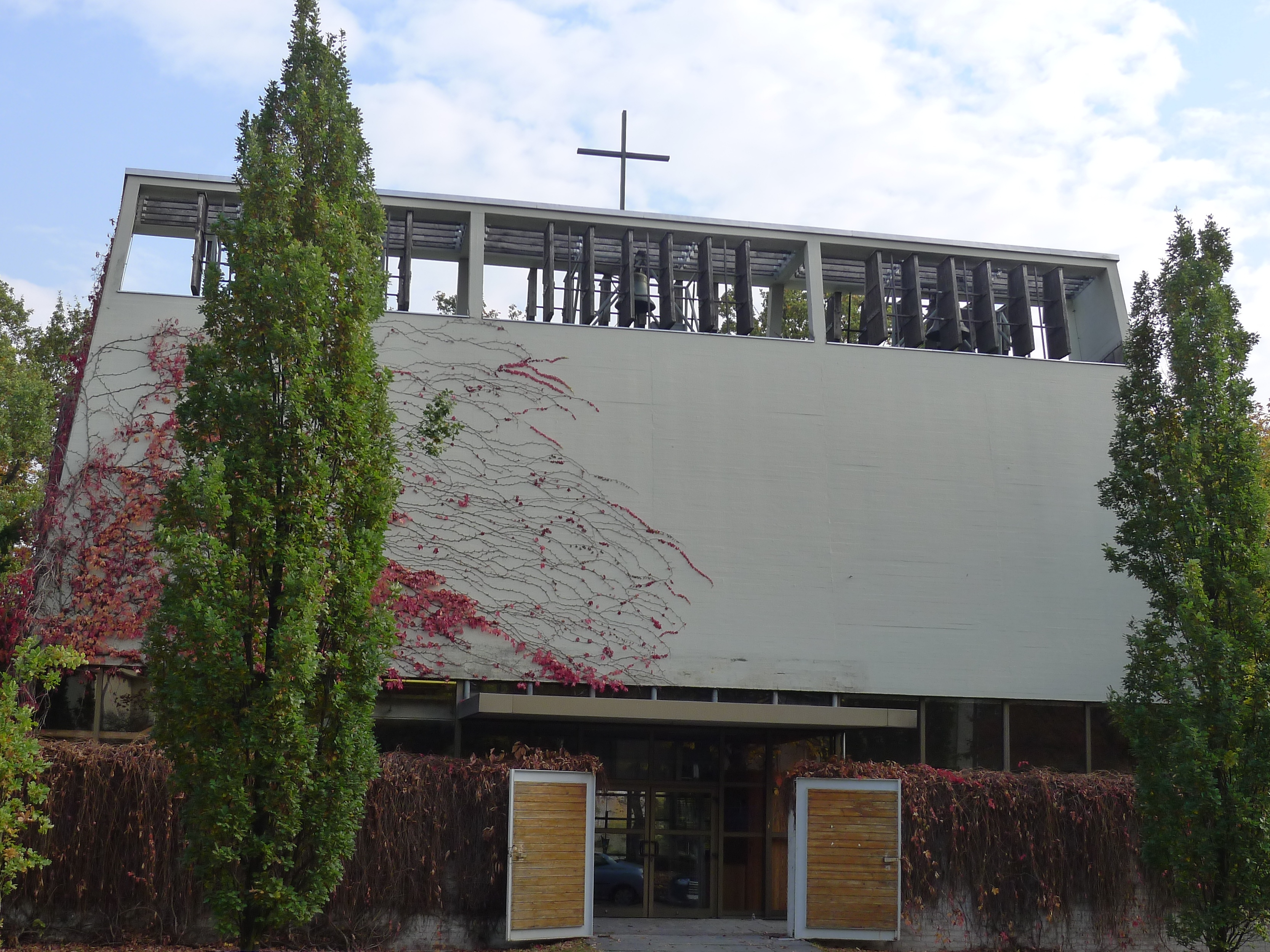 Ansicht der Kirche zur Straße